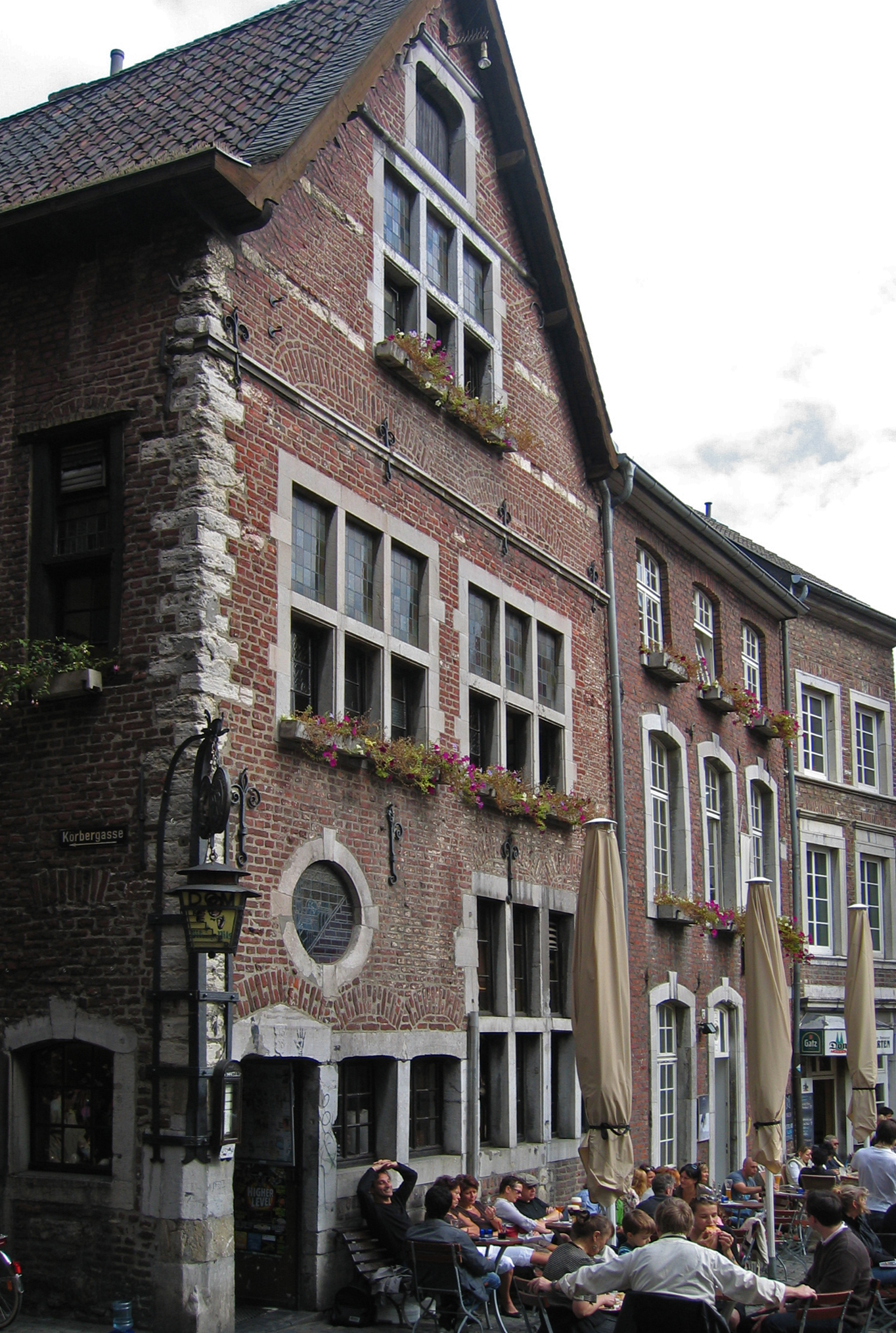 Domkeller in Aachen